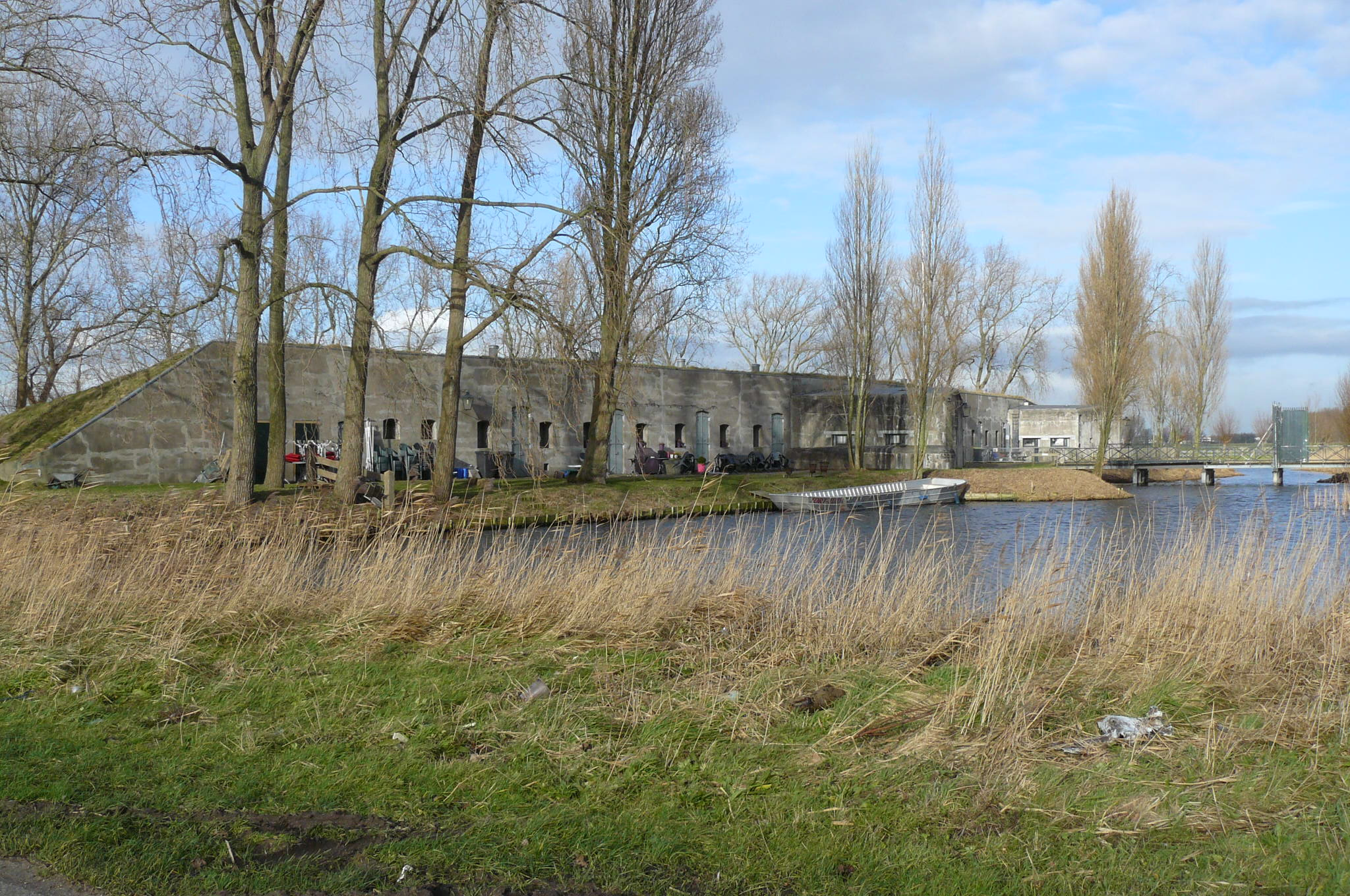 Zicht op de gehele keelzijde van het Fort bezuiden Spaarndam.